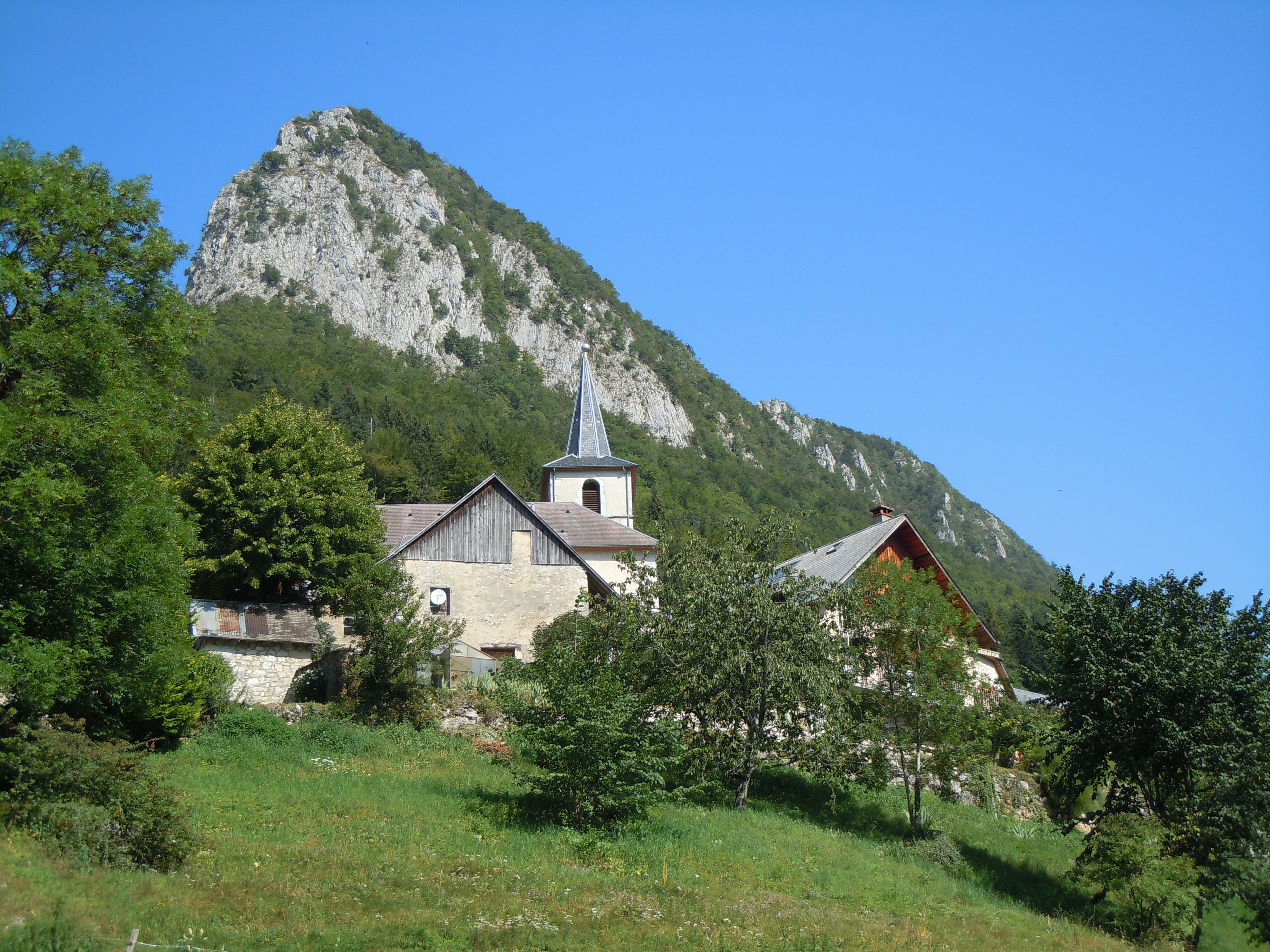 Pointe de Thivelet - Corbel - Savoie